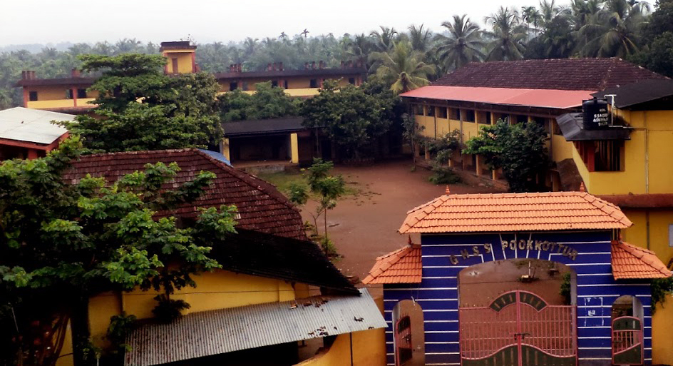 പൂക്കോട്ടൂർ ഗവ: ഹയർ സെക്കണ്ടറി സ്കൂൾ അറവങ്കര, പൂക്കോട്ടൂർ പഞ്ചായത്ത്. 1958 ലാണ് ഈ സ്കൂൾ സ്ഥാപിതമായത്.യു പി തലം മുതൽ ഹയർ സെക്കണ്ടറി വരെ പഠന വിഭാഗങ്ങൾ ഉണ്ട്. പാഠ്യ പാഠ്യേതര വിഷയങ്ങളിൽ മുൻ പന്തിയിൽ നിൽക്കുന്ന ഒരു ഗവ: പൊതു വിദ്യാലയമാണിത്.